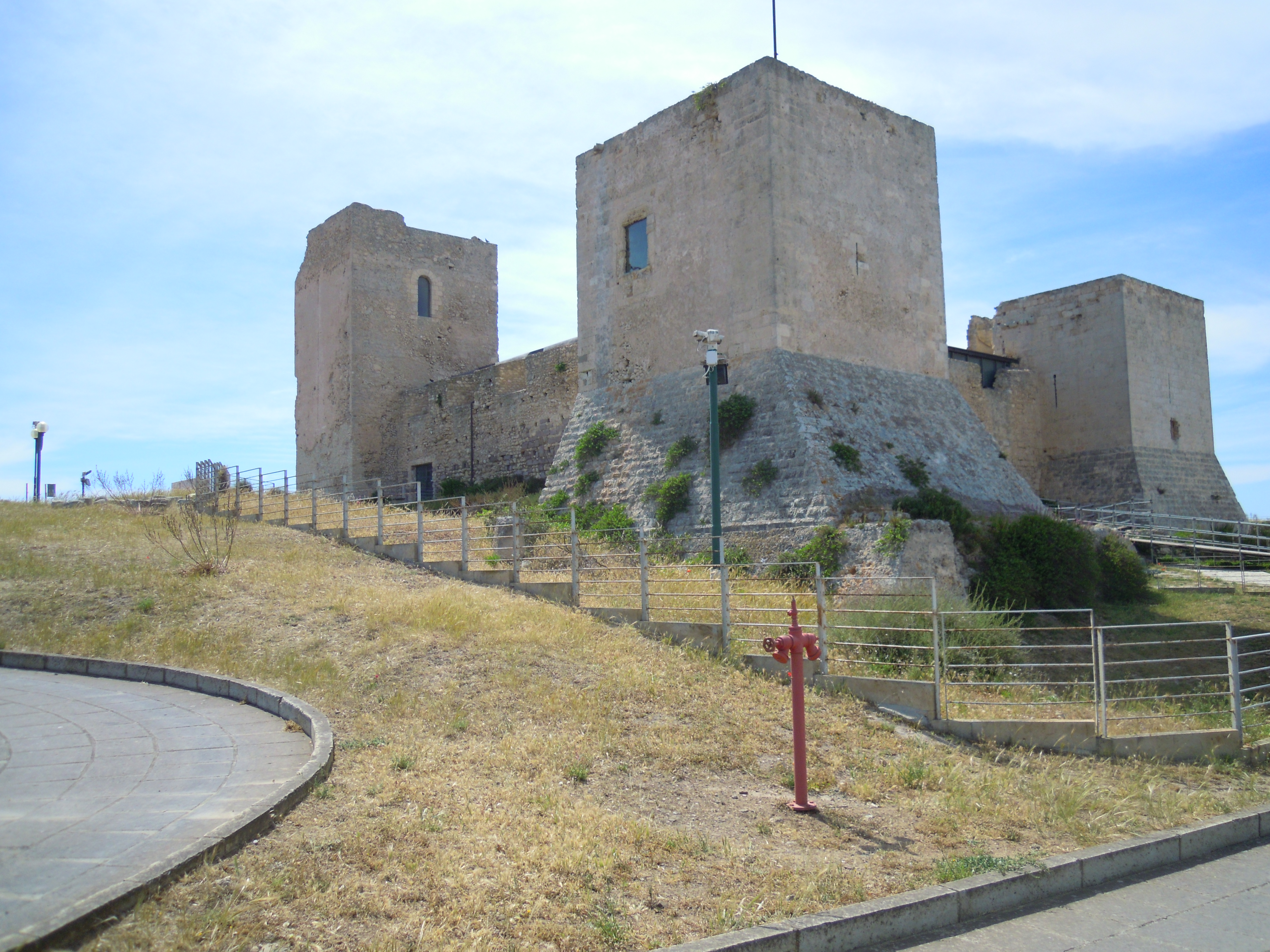 Castello di San Michele This is a photo of a monument which is part of cultural heritage of Italy.